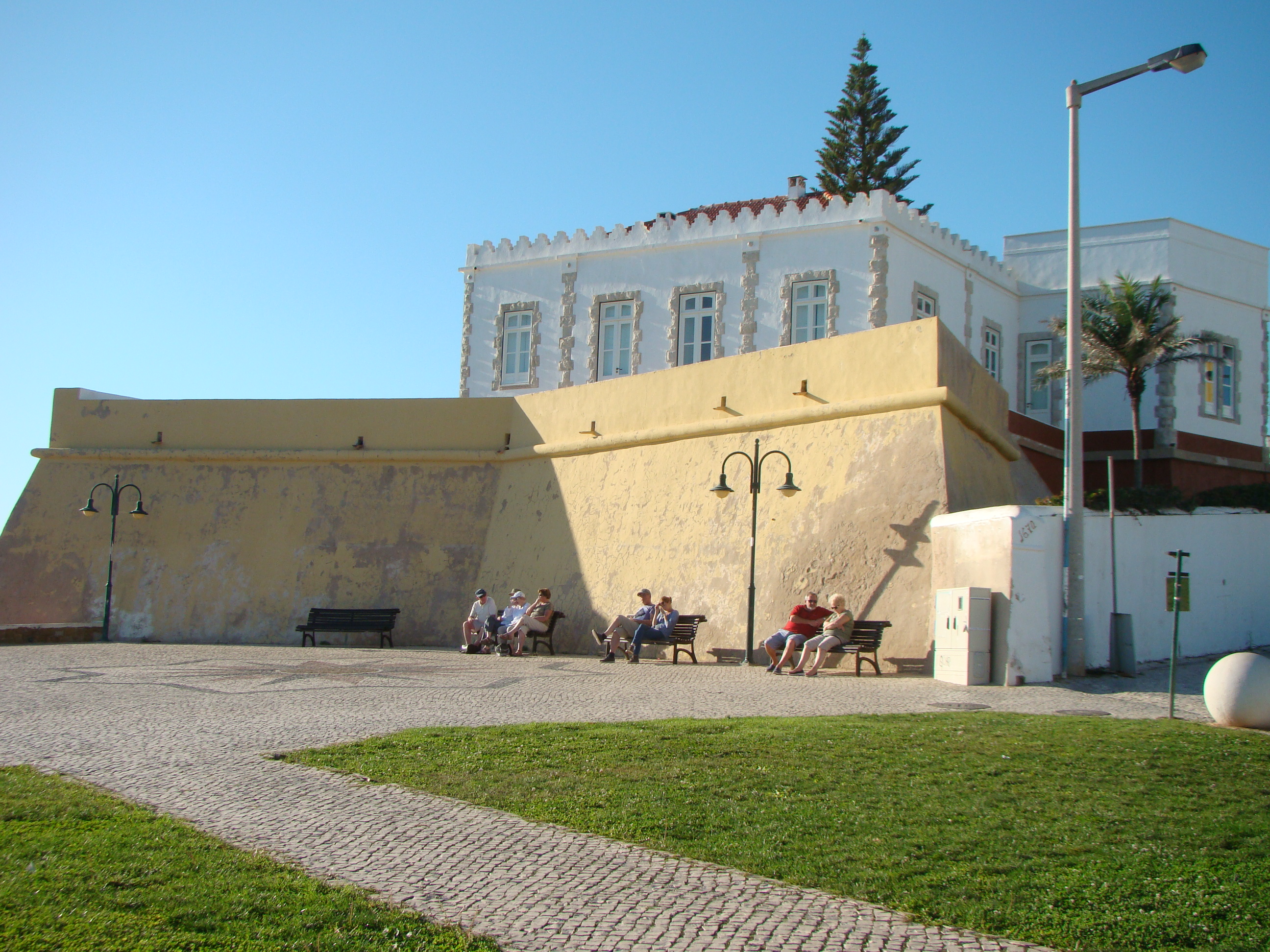 Castelo da Senhora da Luz, construído entre 1640 e 1670